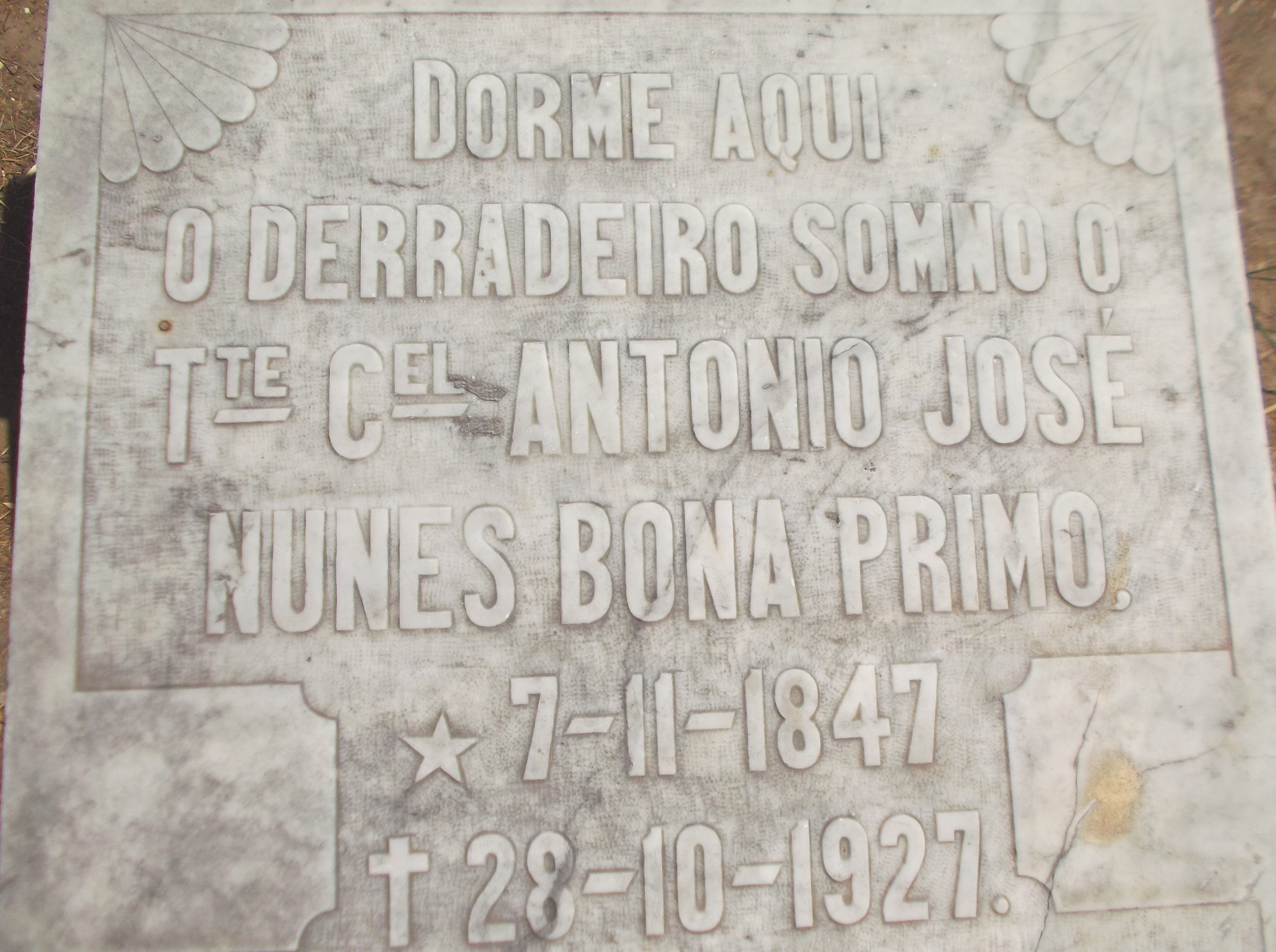 Imagem da lápide do túmulo de Antonio José Nunes Bona Primo. Um político, militar e fazendeiro que denomina a Prça Bona Primo em Campo Maior-Piauí.